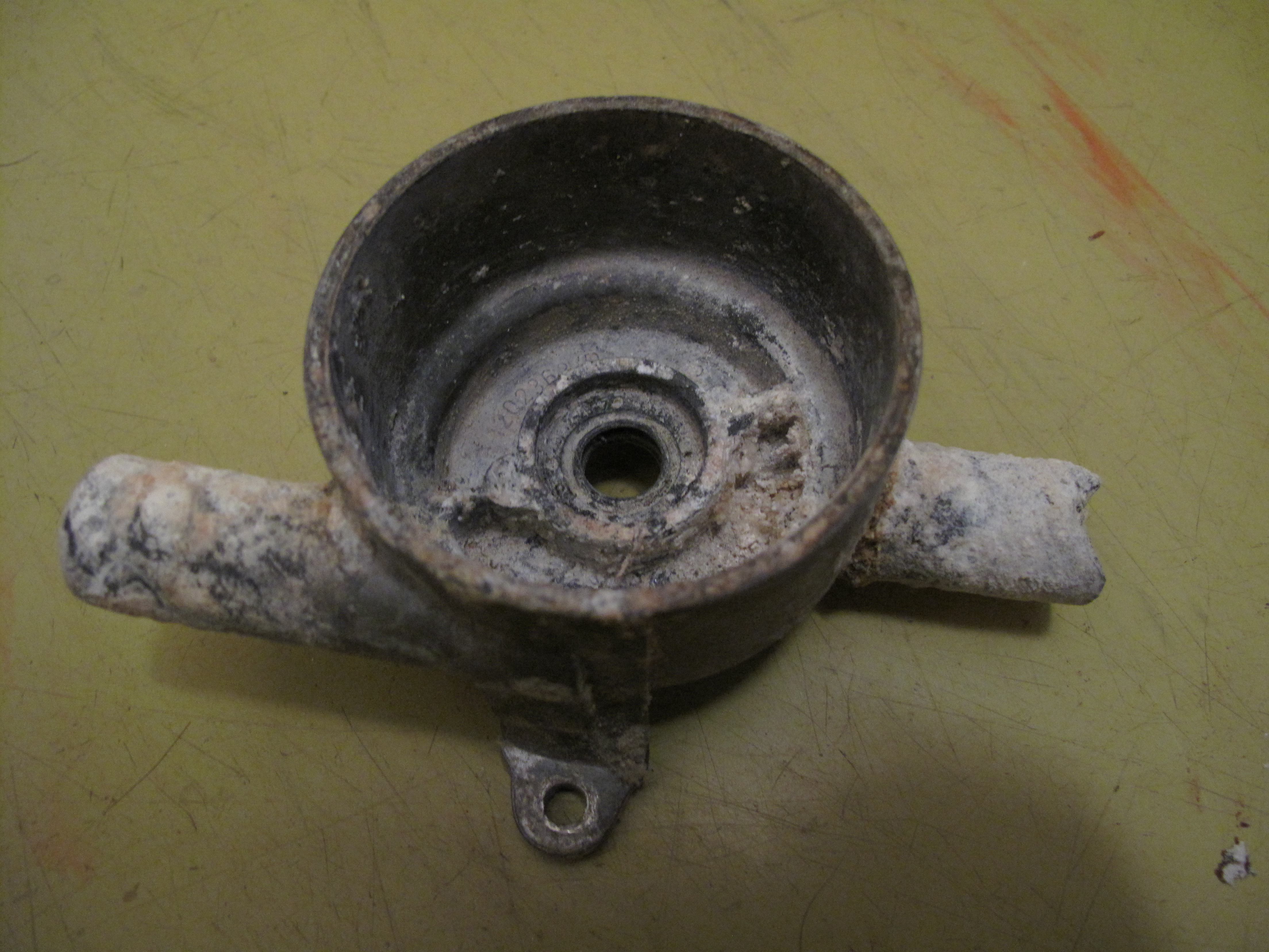 Vnitřek starého čerpadla pračky Romo. Čerpadl je zaneseno kusy tkaniny a usazenými pracími prášky včetně vodního kamene.